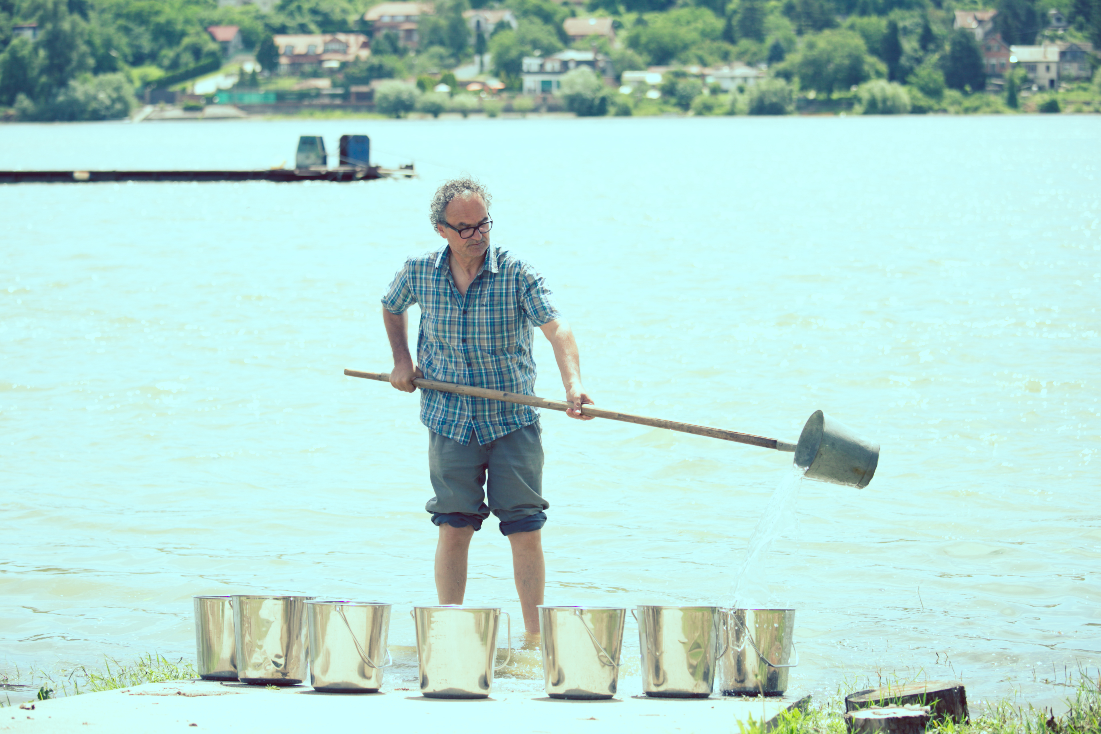 Persönliche Schöpfung, die in das Großprojekt "Brückenschlag - Donauschöpfung" auswuchs.